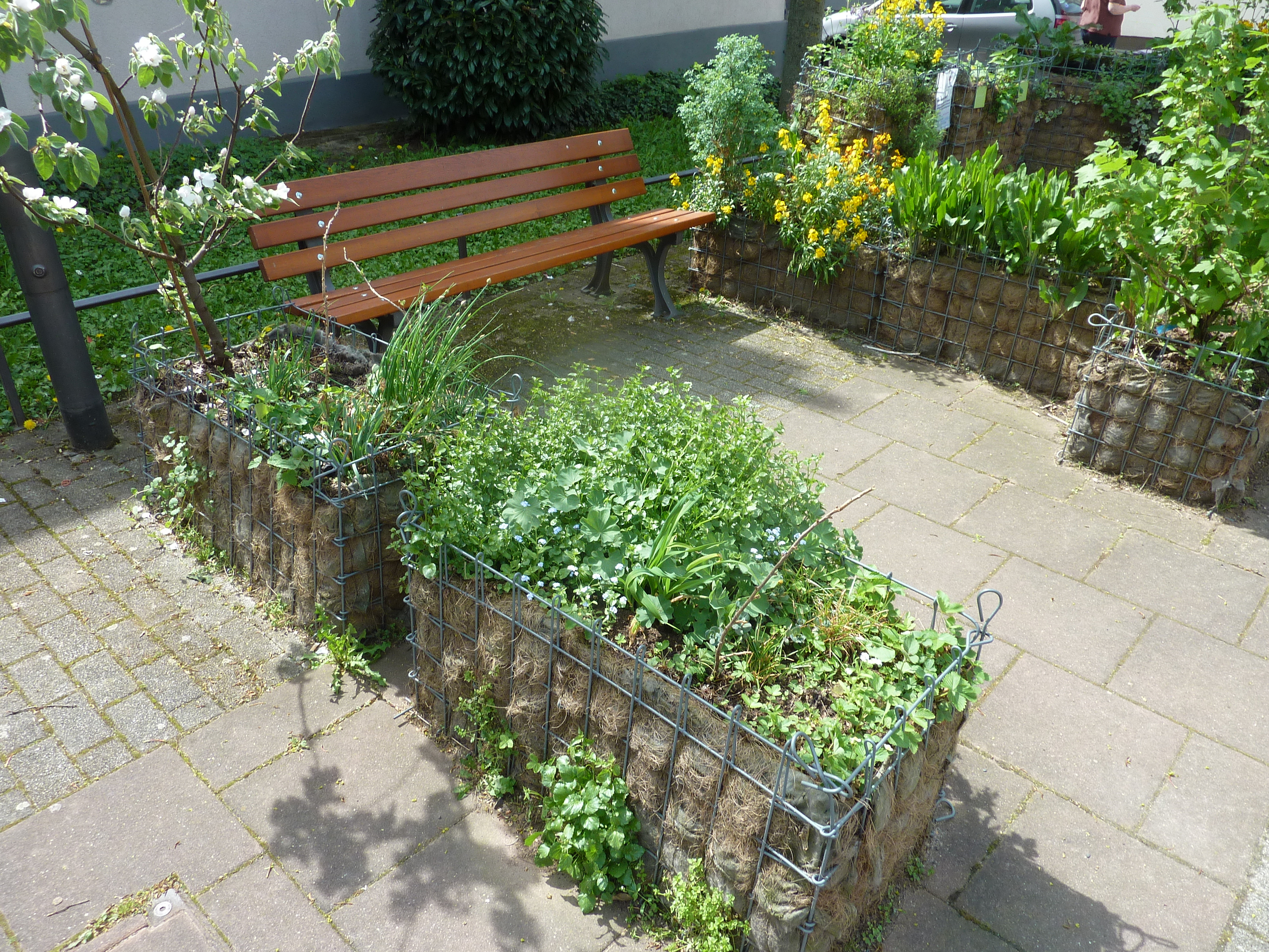 Das Kirchplatzgärtchen ist ein öffentlicher Bürgergarten des Urbanen Gartenbaus in Frankfurt-Ginnheim. In Zusammenarbeit mit dem Frankfurter Projekt Stadtlabor unterwegs wurden auf dem Platz vor der Alten Bethlehemkirche in Gabionen insgesamt 32 Hochbeete angelegt, für die die Anwohner Patenschaften übernommen haben.